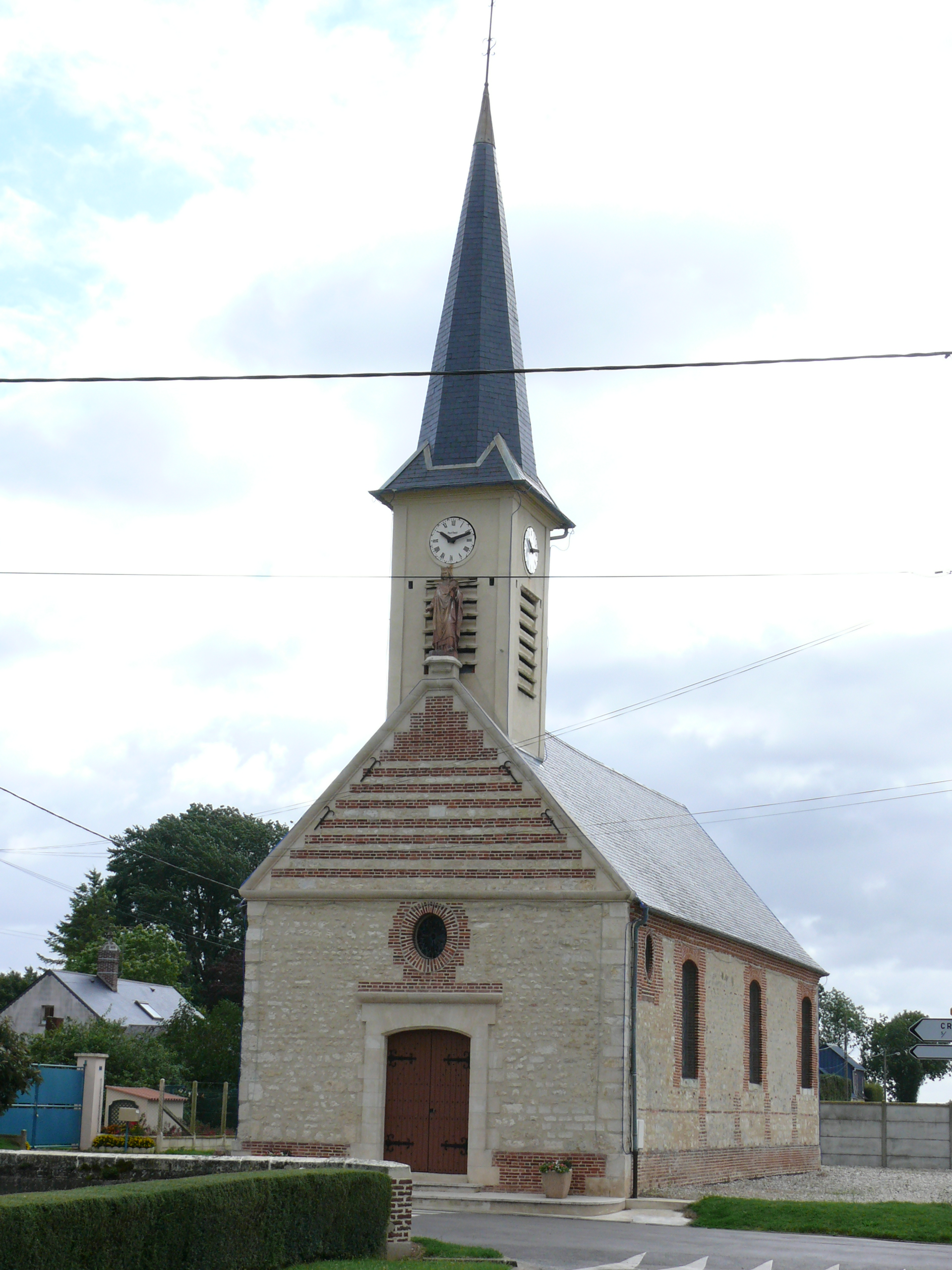 Le Crocq - Eglise Saint-Louis